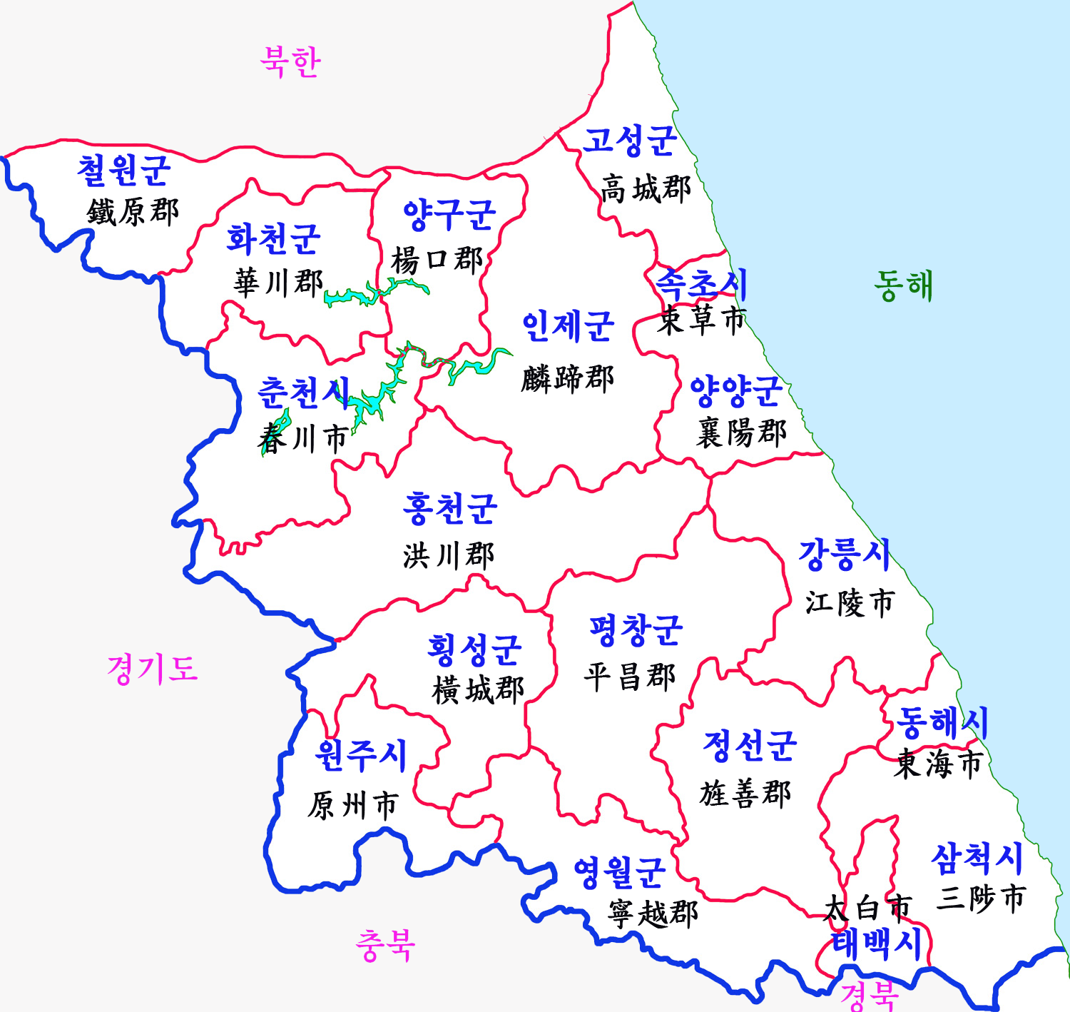 강원도 행정구역